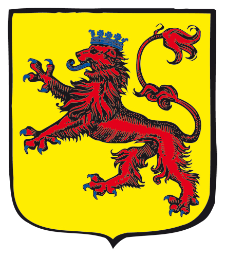 Armes de Coataudon